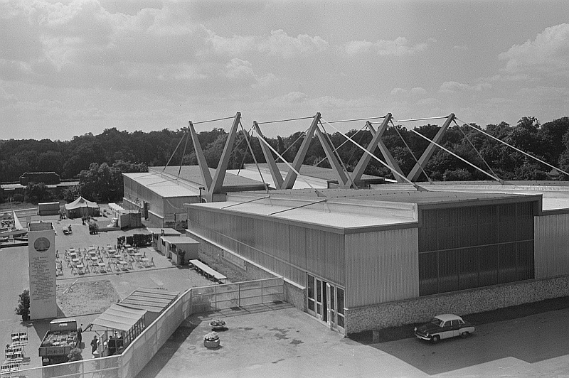 Original image description from the Deutsche Fotothek Dresden. Ausstellungshallen am Fucikplatz, 1969 von G. Fischer